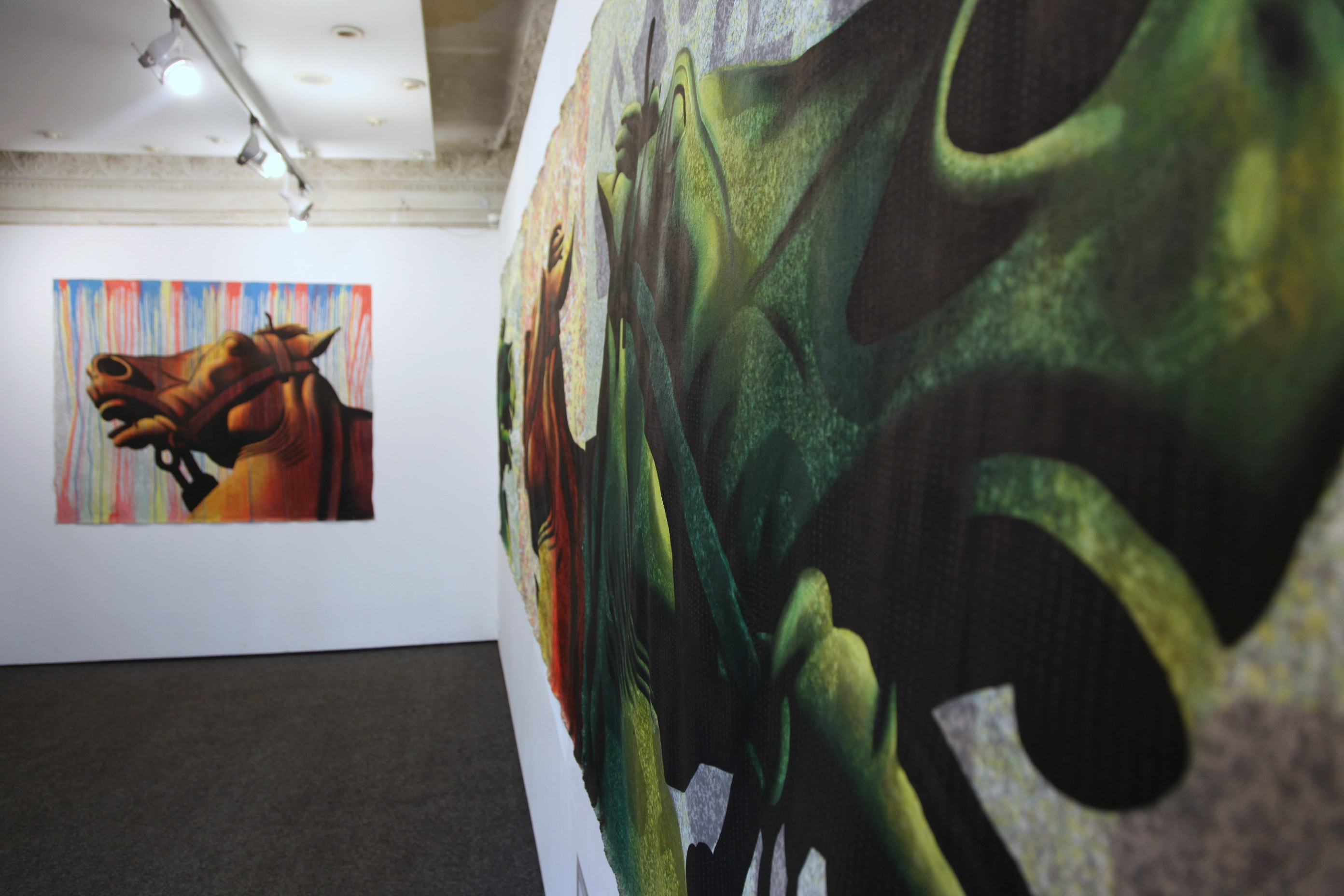 Карась Галерея експозиція виставки "Безумство та спокій" Володимира Яковця. 2017 рік.